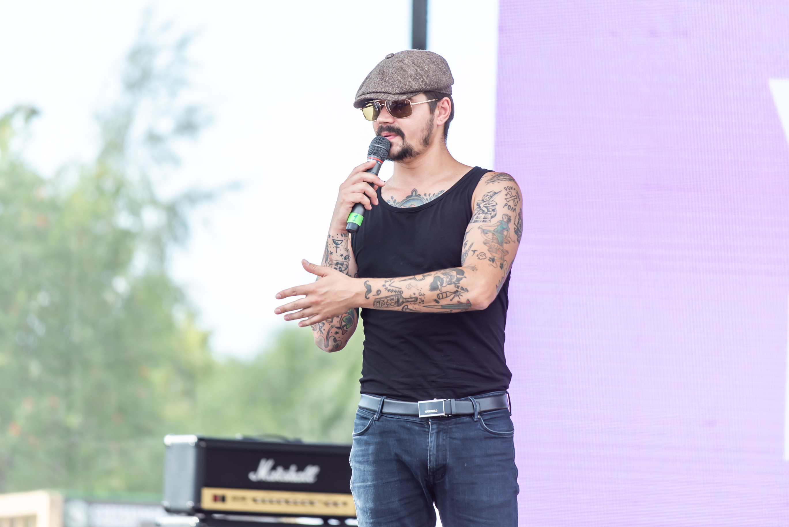 Юра Музыченко на VK Fest 5